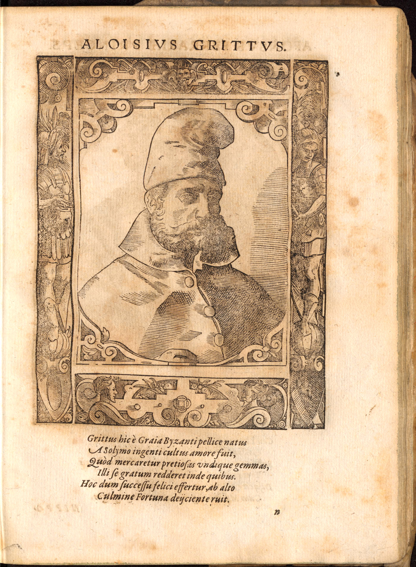 Gritti Alajos